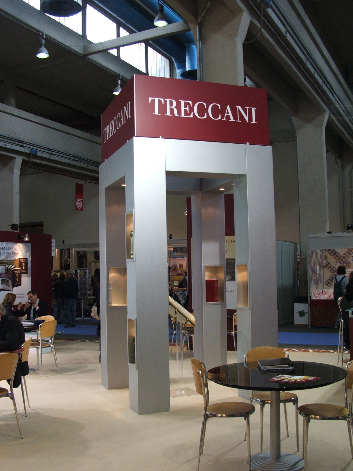 Torino Fiera internazionale del libro 2006